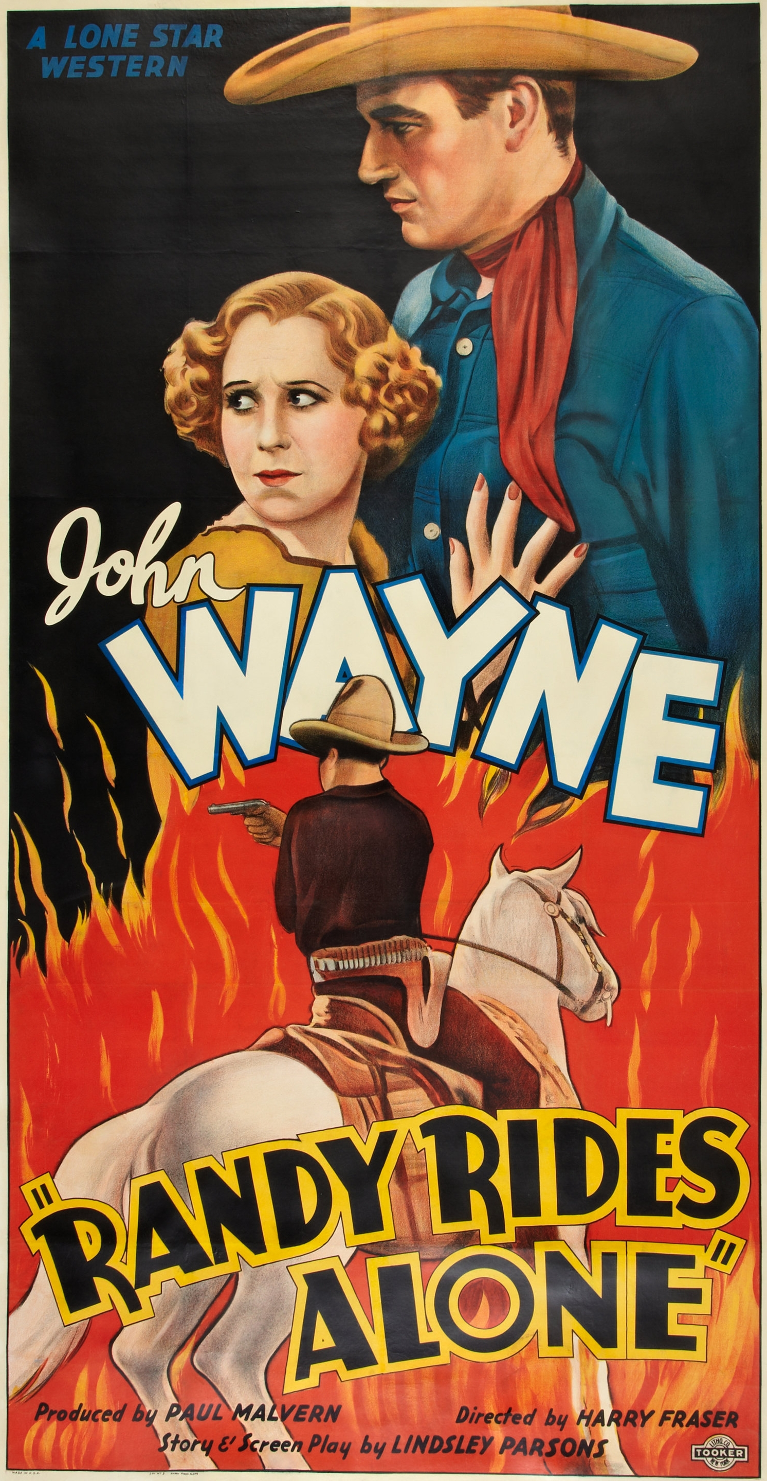 Poster del film Randy Rides Alone